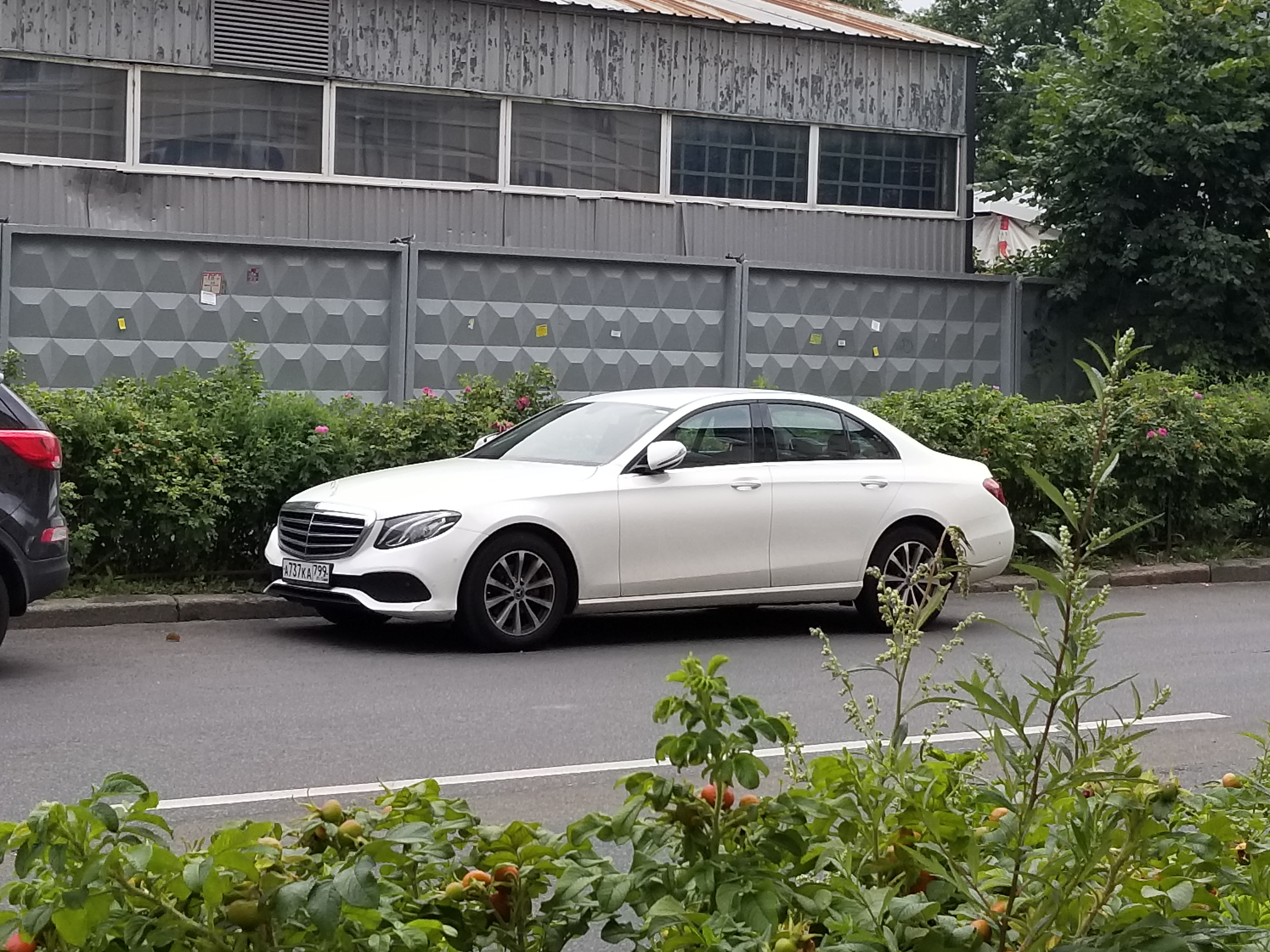 Mercedes E200 каршеринга Яндекс.Драйв на улице Профессора Ивашенцова в Санкт-Петербурге. Номерной знак: А737КА799. Ссылка